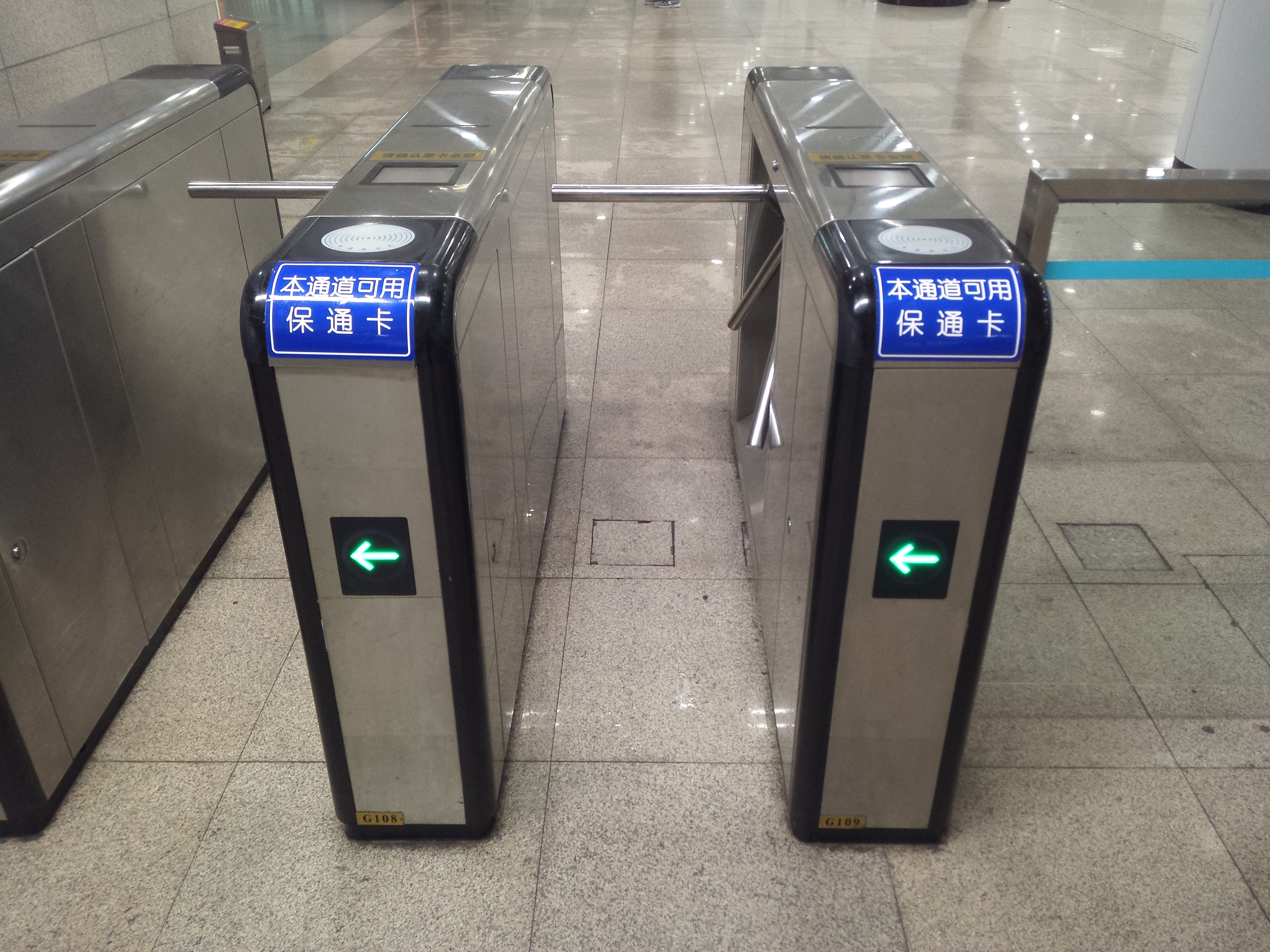 保通卡闸机通道 摄于上海轨交老西门站